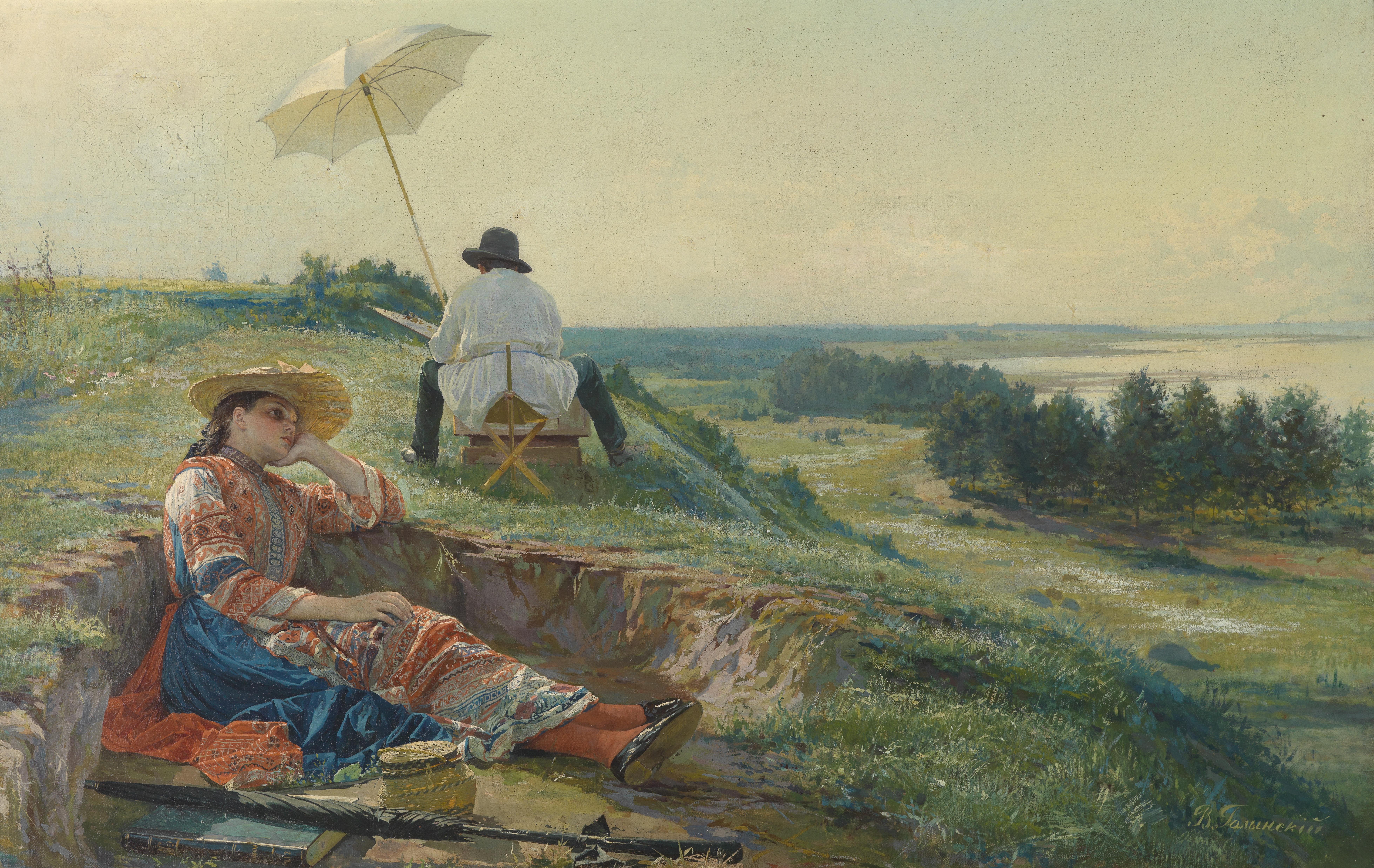 Ein heißer Sommertag (Der Künstler bei der Arbeit), signiert (kyrillisch) V. Golynsky, Öl auf Leinwand, 70,5 x 108 cm